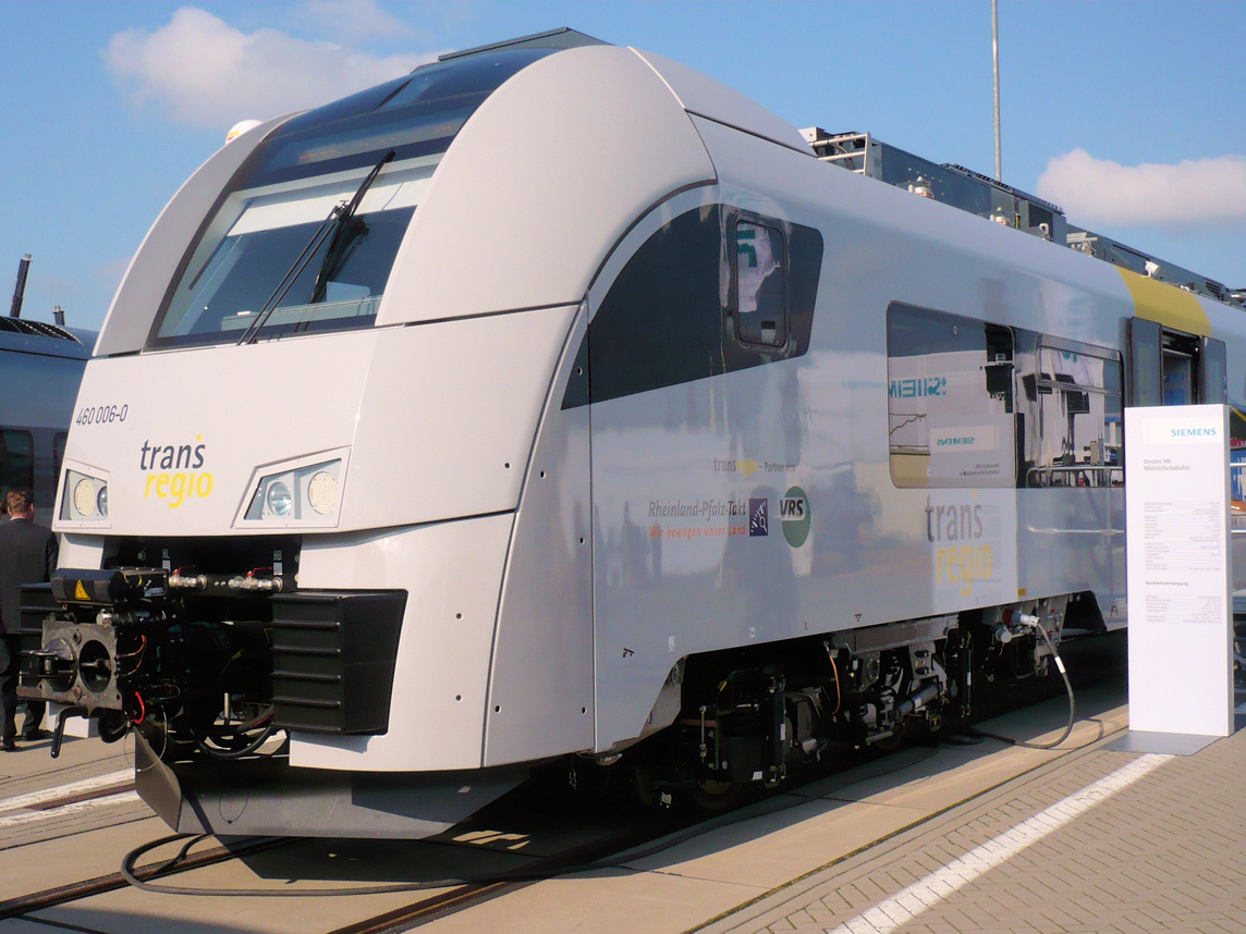 Siemens Desiro ML der TransRegio auf der Innotrans 2008